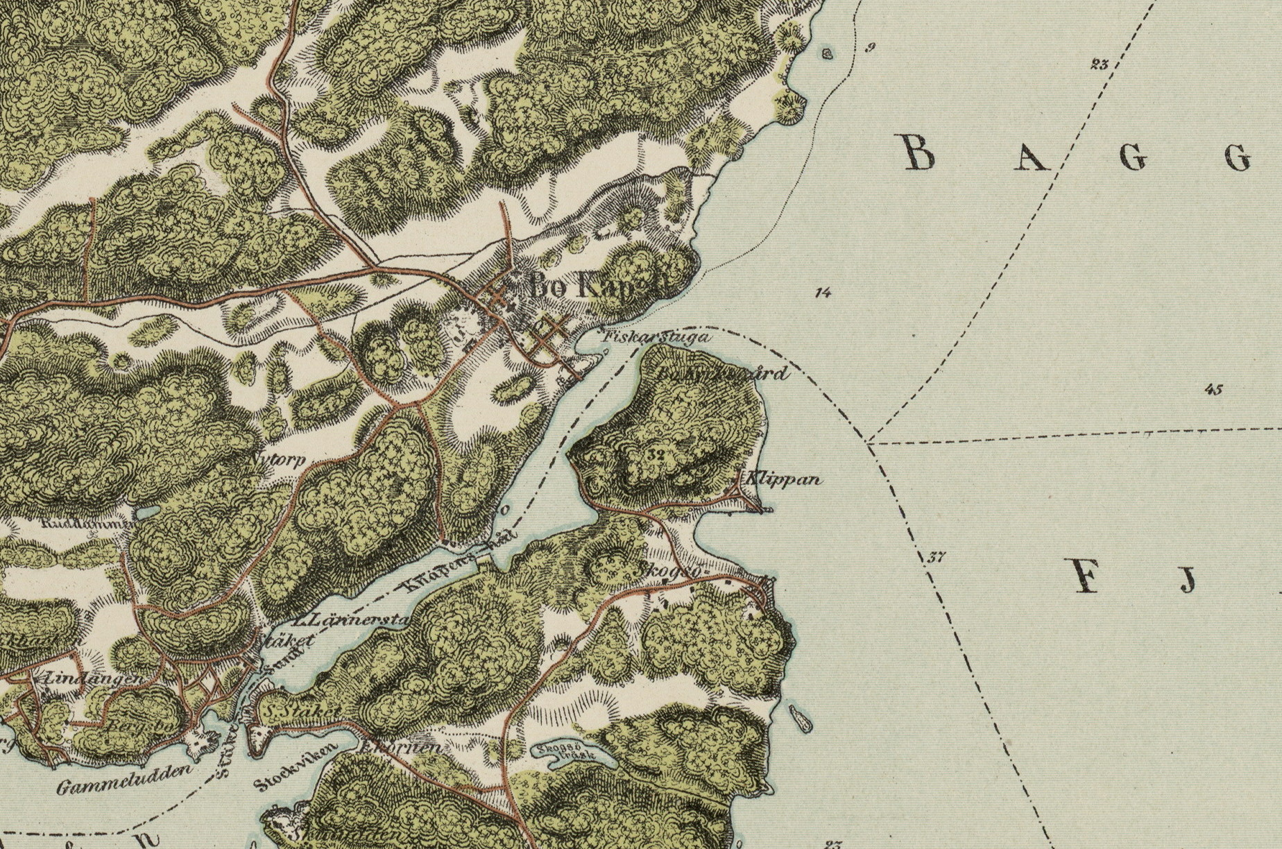 Boo gård på Topografiska Corpsens karta